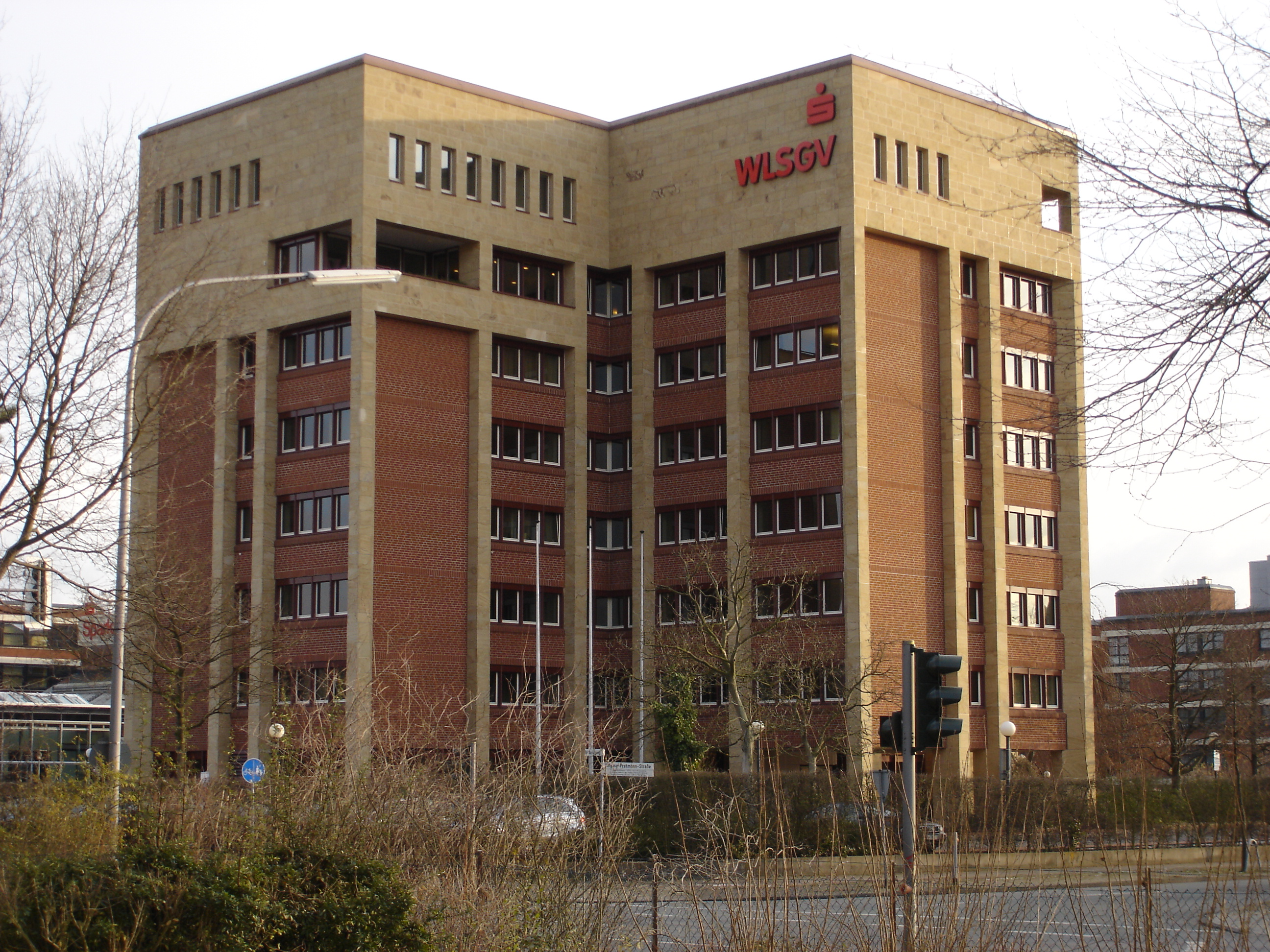 Office building of the "Westfälisch-Lippische Sparkassen- und Giroverband" in Münster, Westphalia, Germany